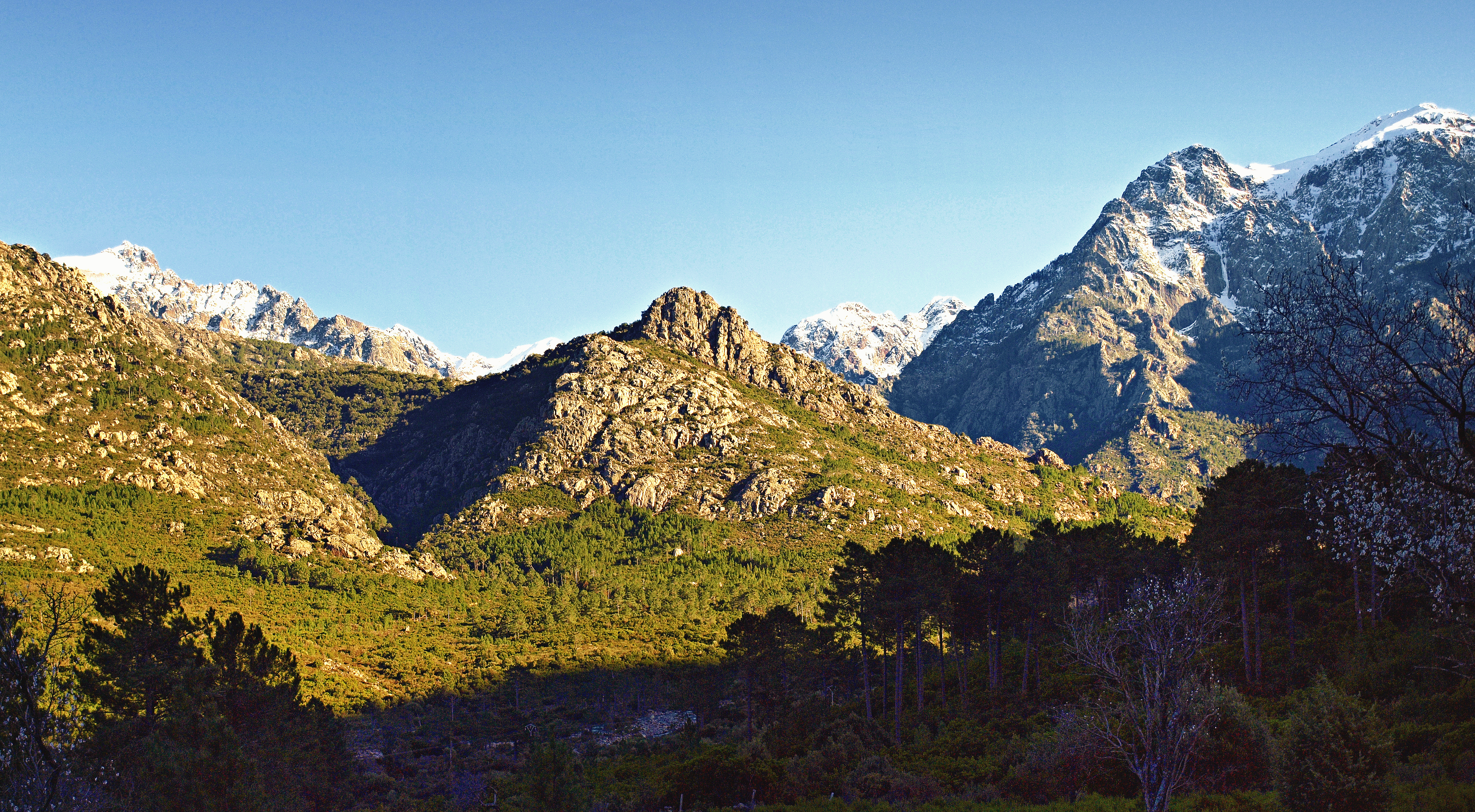 Calenzana (Corsica) - Cirque de Bonifatu